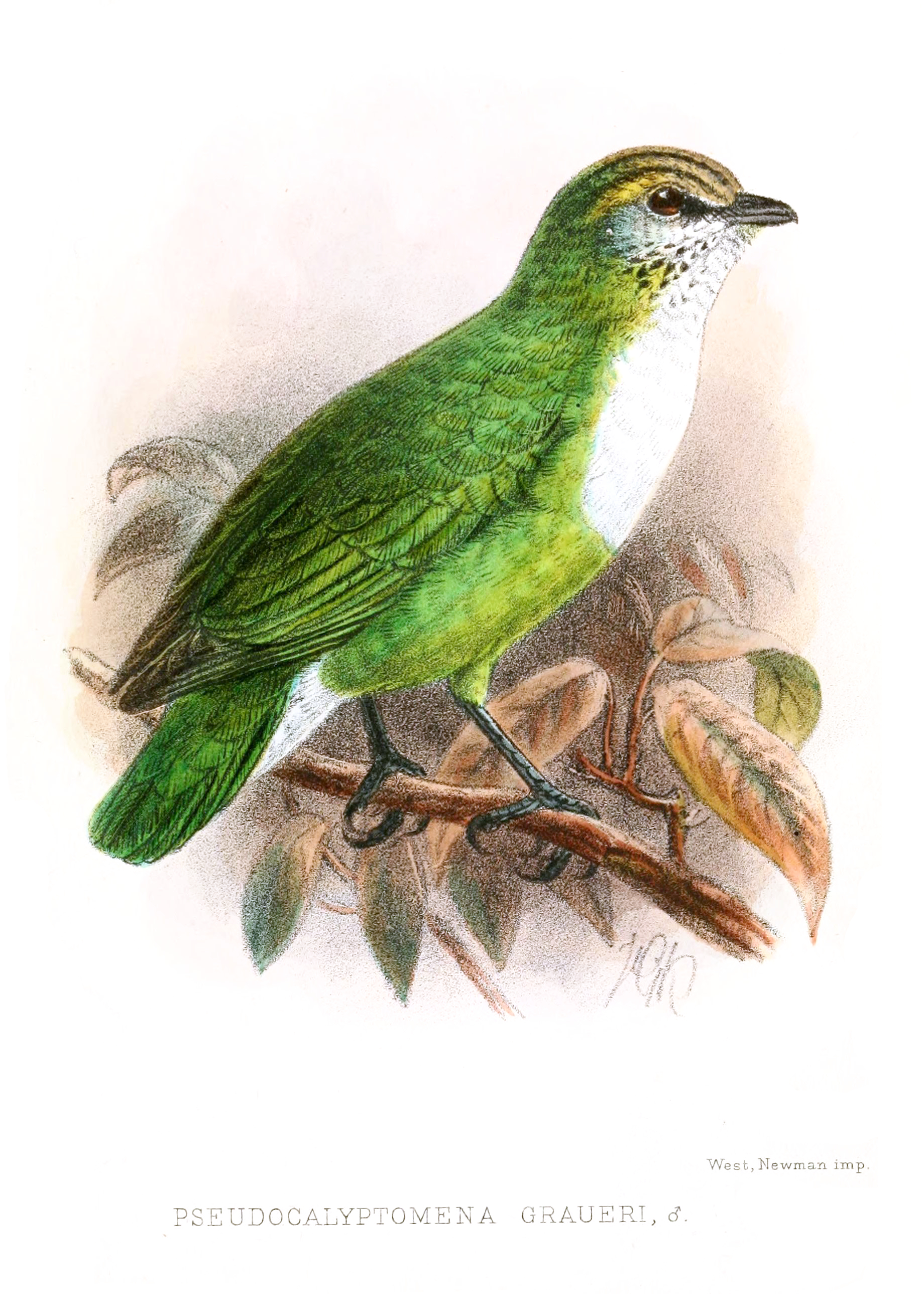 Pseudocalyptomena graueri